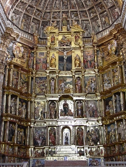 Retablo mayor de la Iglesia de San Jerónimo de Granada